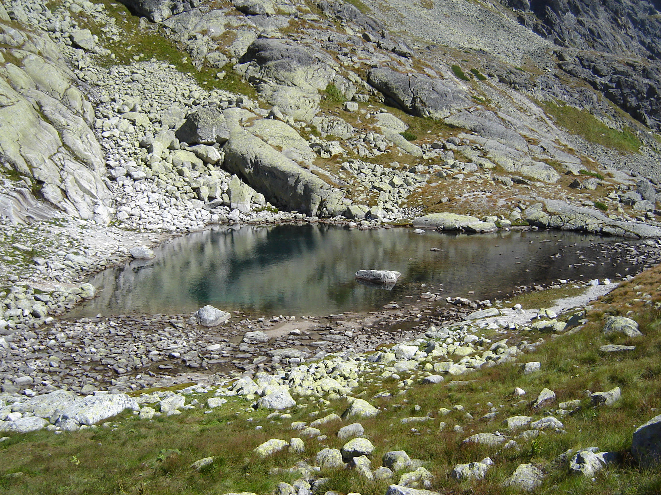 Malé Spišské pleso